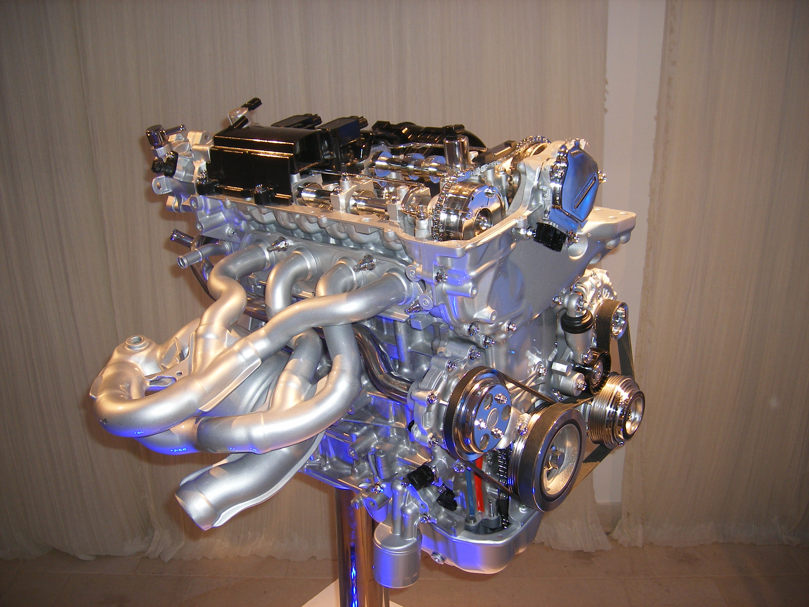 Motor Skyactiv-G, el primer motor de gasolina en serie con una relación de compresión de 14,0 a 1.